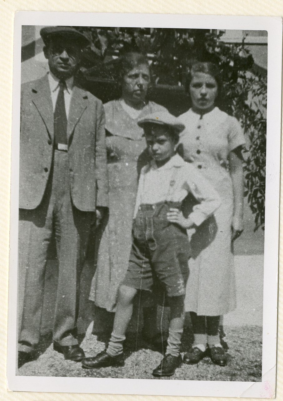 צבי כרמל עם הוריו ואחותו, 1935